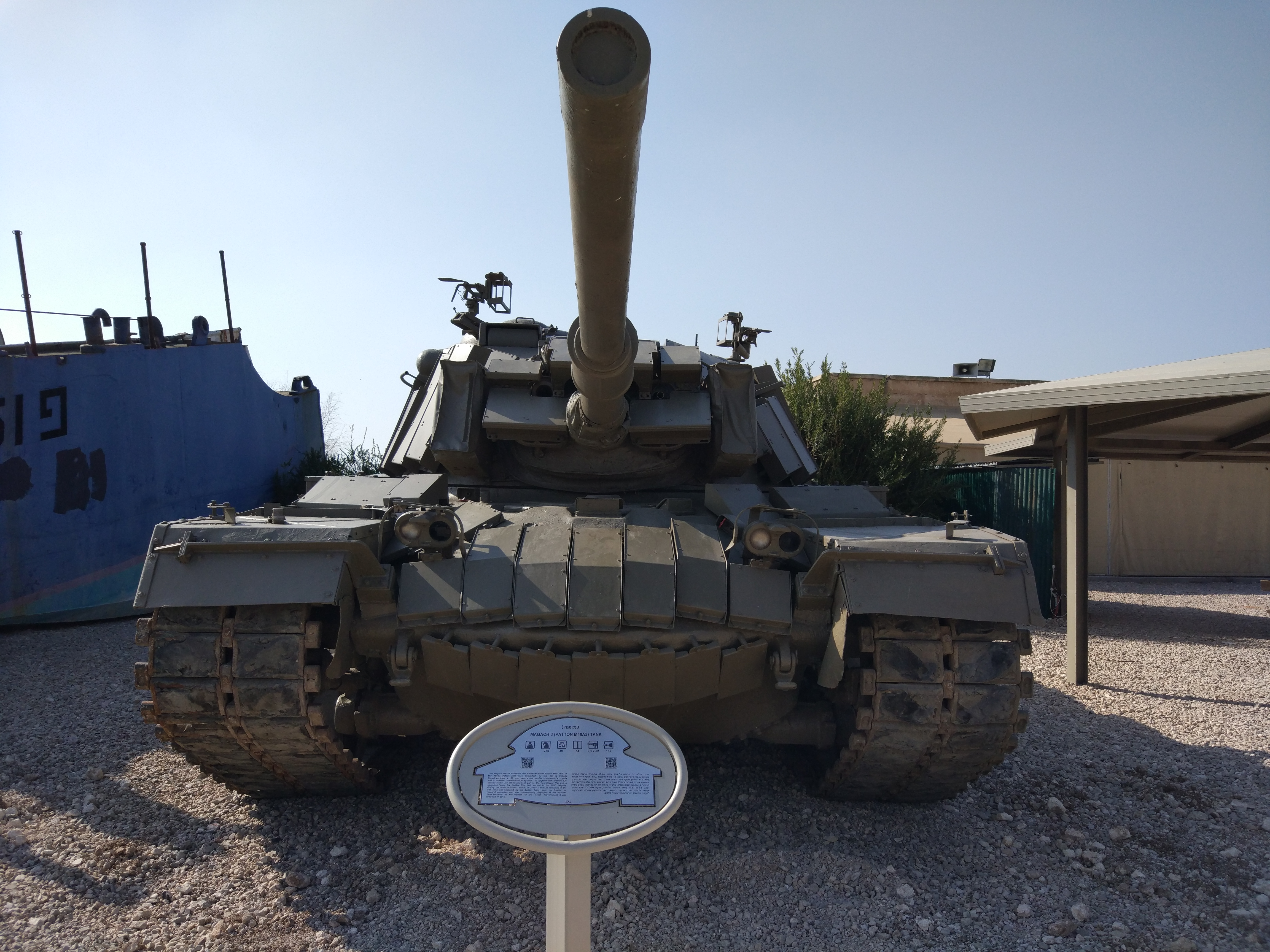 טנק מגח 3 שהשתתף בקרב סולטאן יעקב. הטנק הוחזר לישראל 2016 ומוצג ביד לשריון, לטרון.